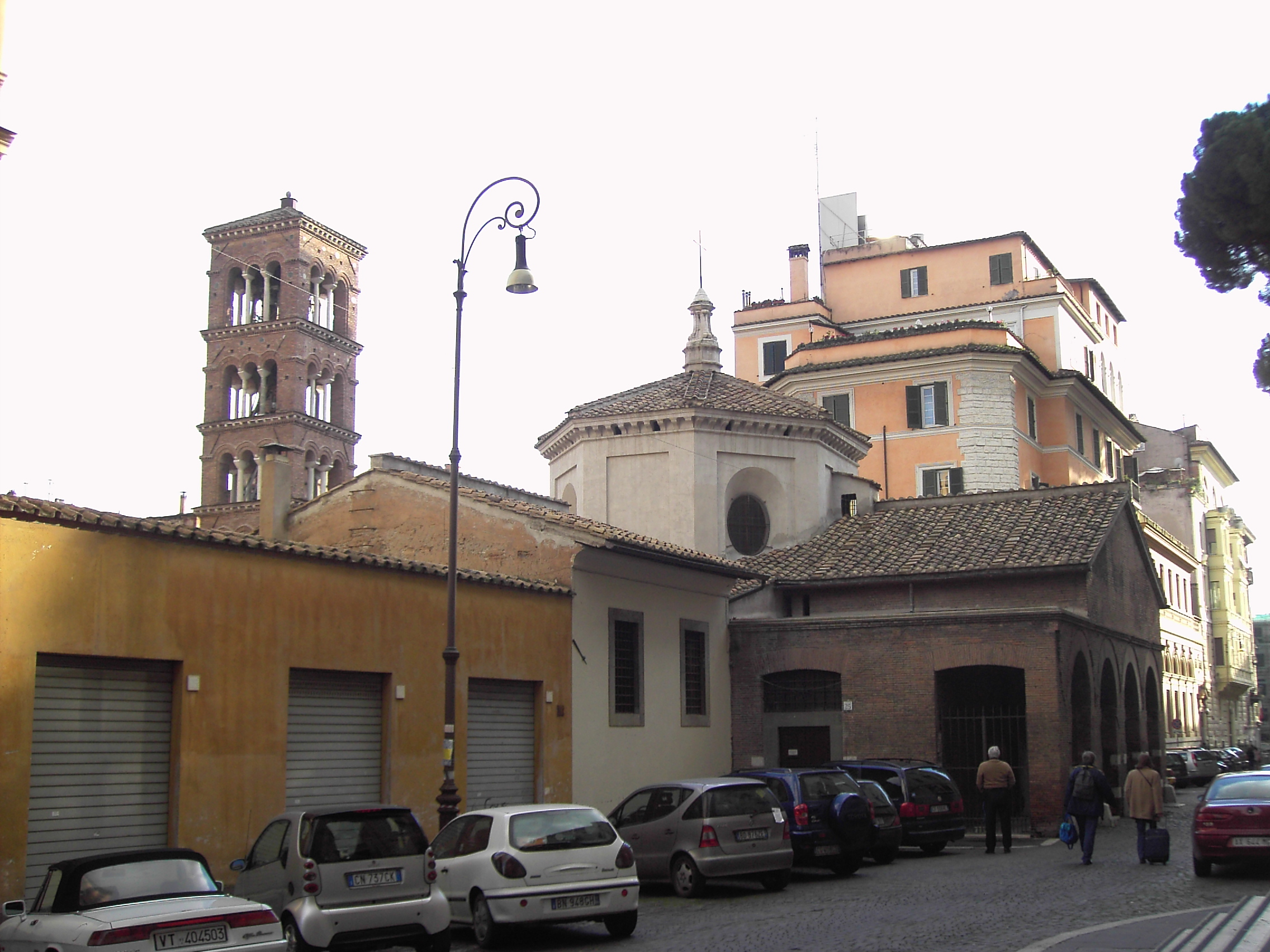 Roma, Santa Pudenziana: oratorio e campanile